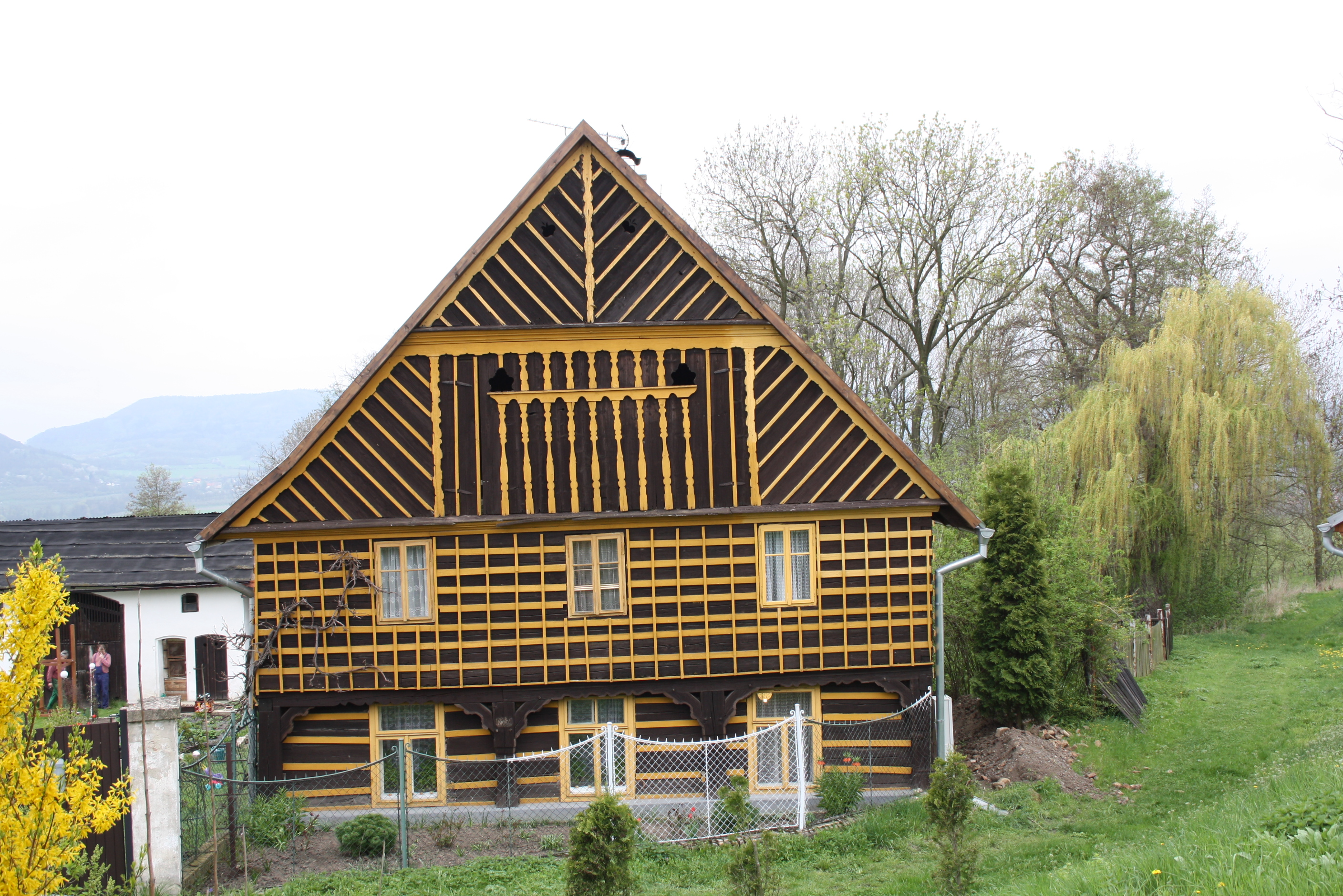 Roubenka v Horních Nezlech, části Liběšic.